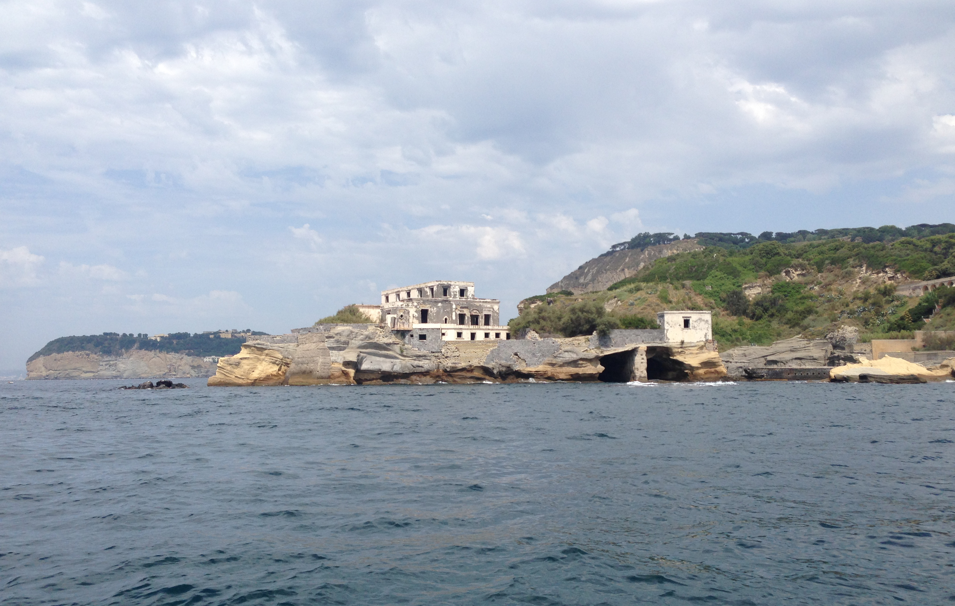 Villa Paratore sullo scoglio della Gaiola